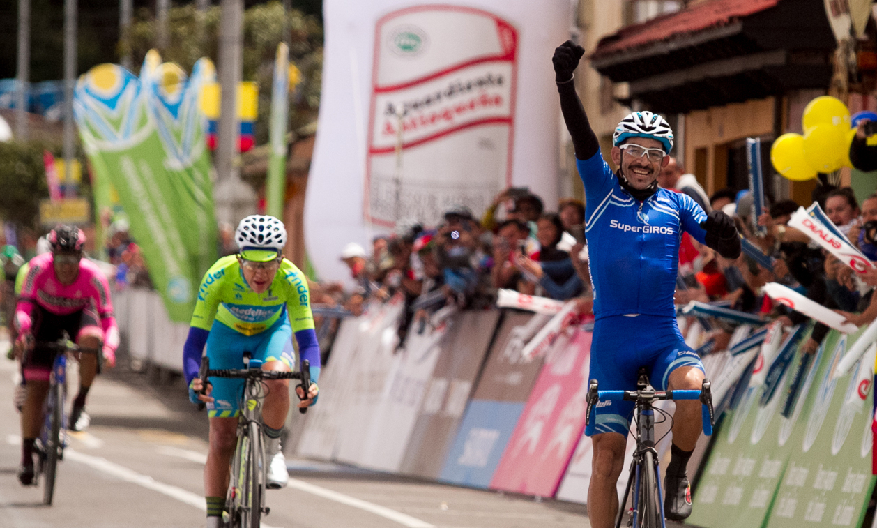 Sprint final Etapa 7 Vuelta a Colombia 2017 Lunes 7 de agosto de 2017. Tunja - Sopó 112,6Kms.